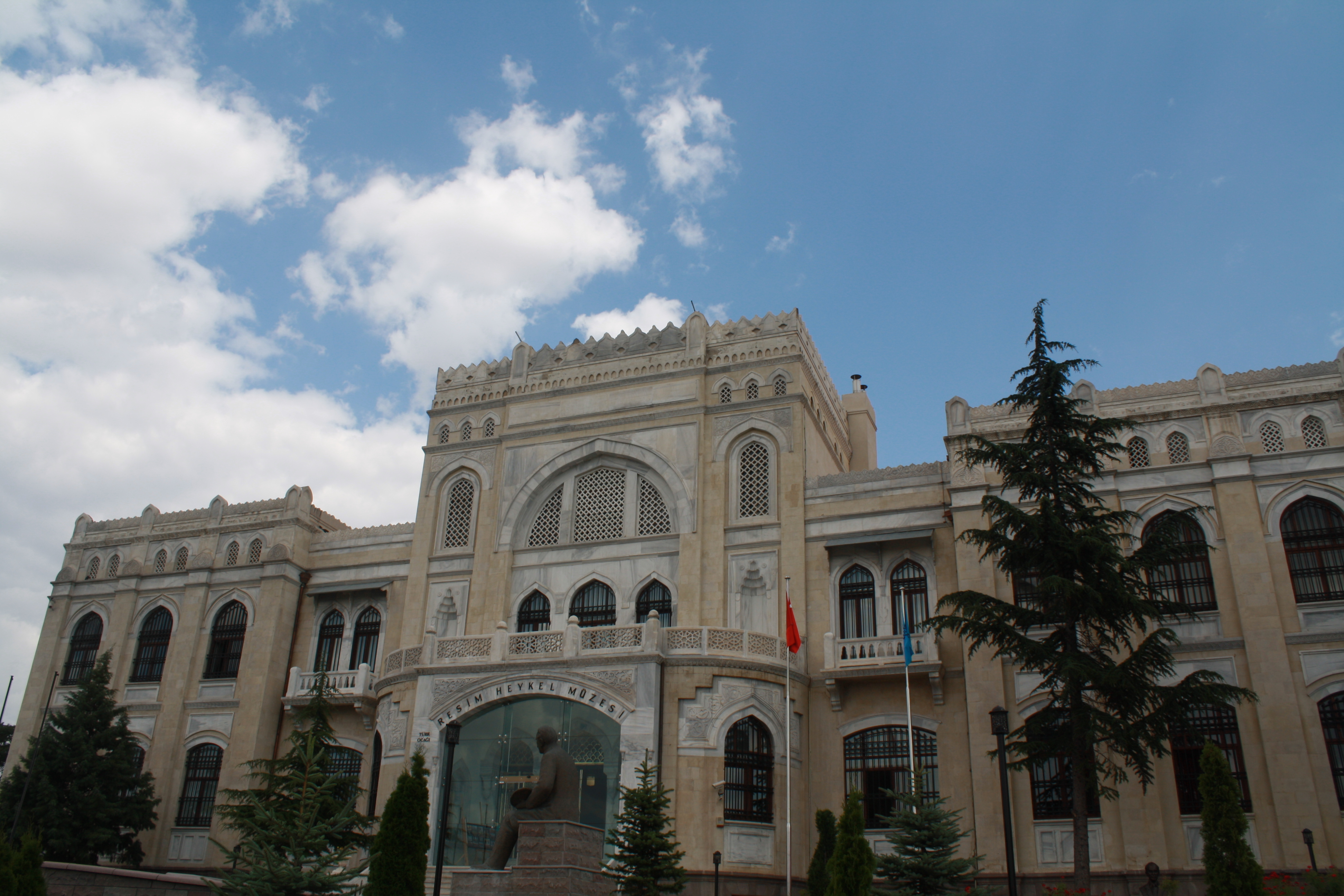 Ankara Devlet Resim Heykel Müzesi